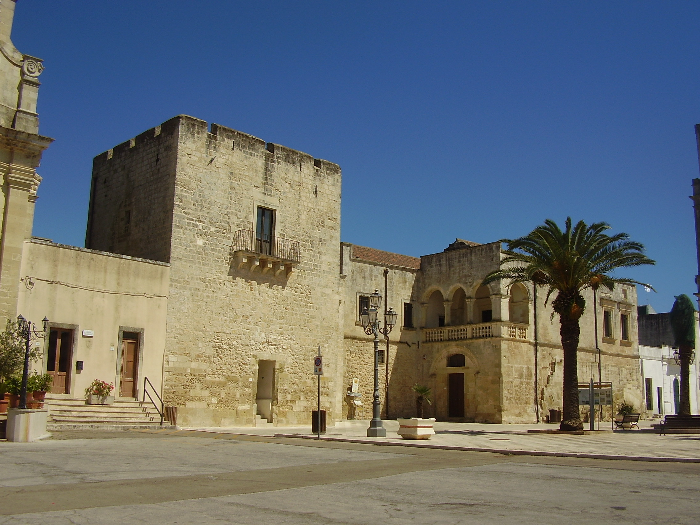 Castello di Vaste, Lecce